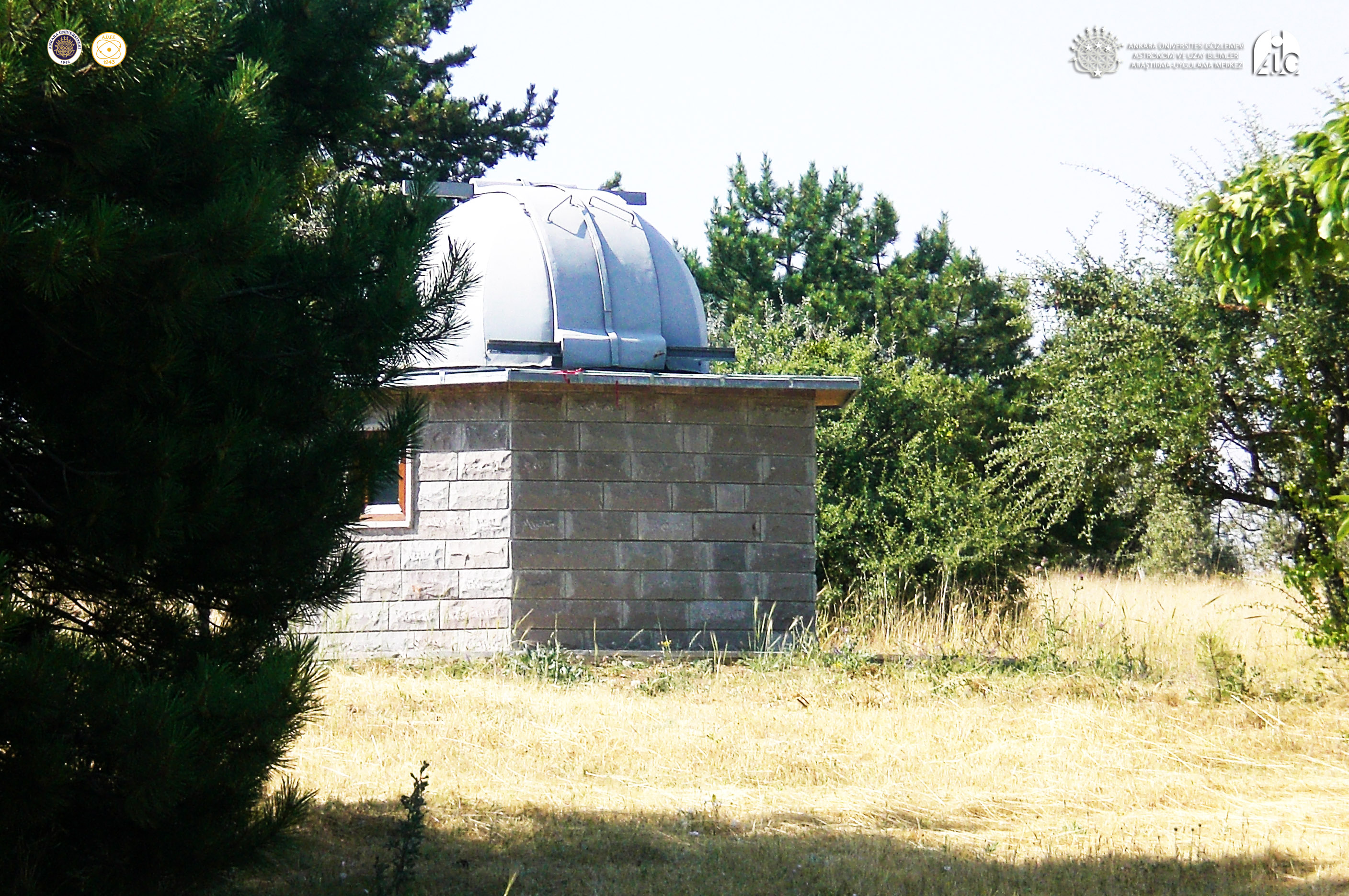 Ankara Üniversitesi Gözlemevi T30 Teleskop Binası